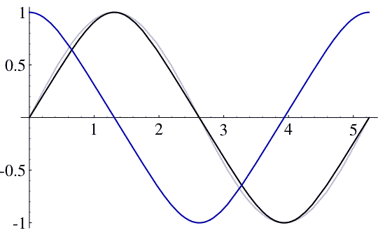 Graphen von sl und cl (sinus lemniscatus und cosinus lemniscatus)